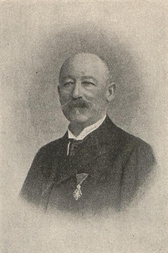 Václav Pavlíček (cca1847-1917)